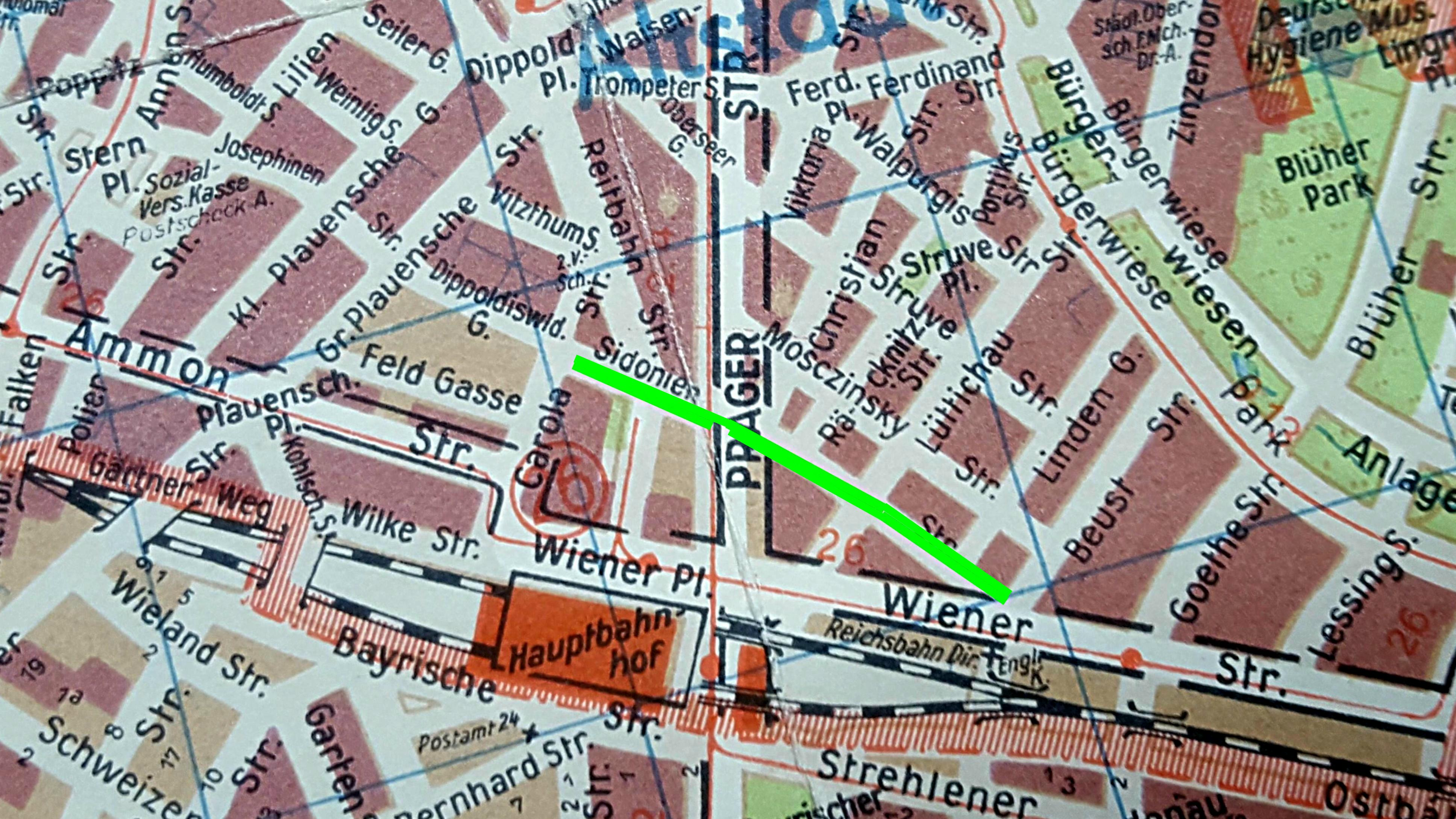 Ausschnitt Stadtplan Dresden von 1948, Seevorstadt-Ost, die lila eingefärbten Gebiete stellen totale Zerstörung dar. Kartenausschnitt. Eingefärbt die Sidonienstr.